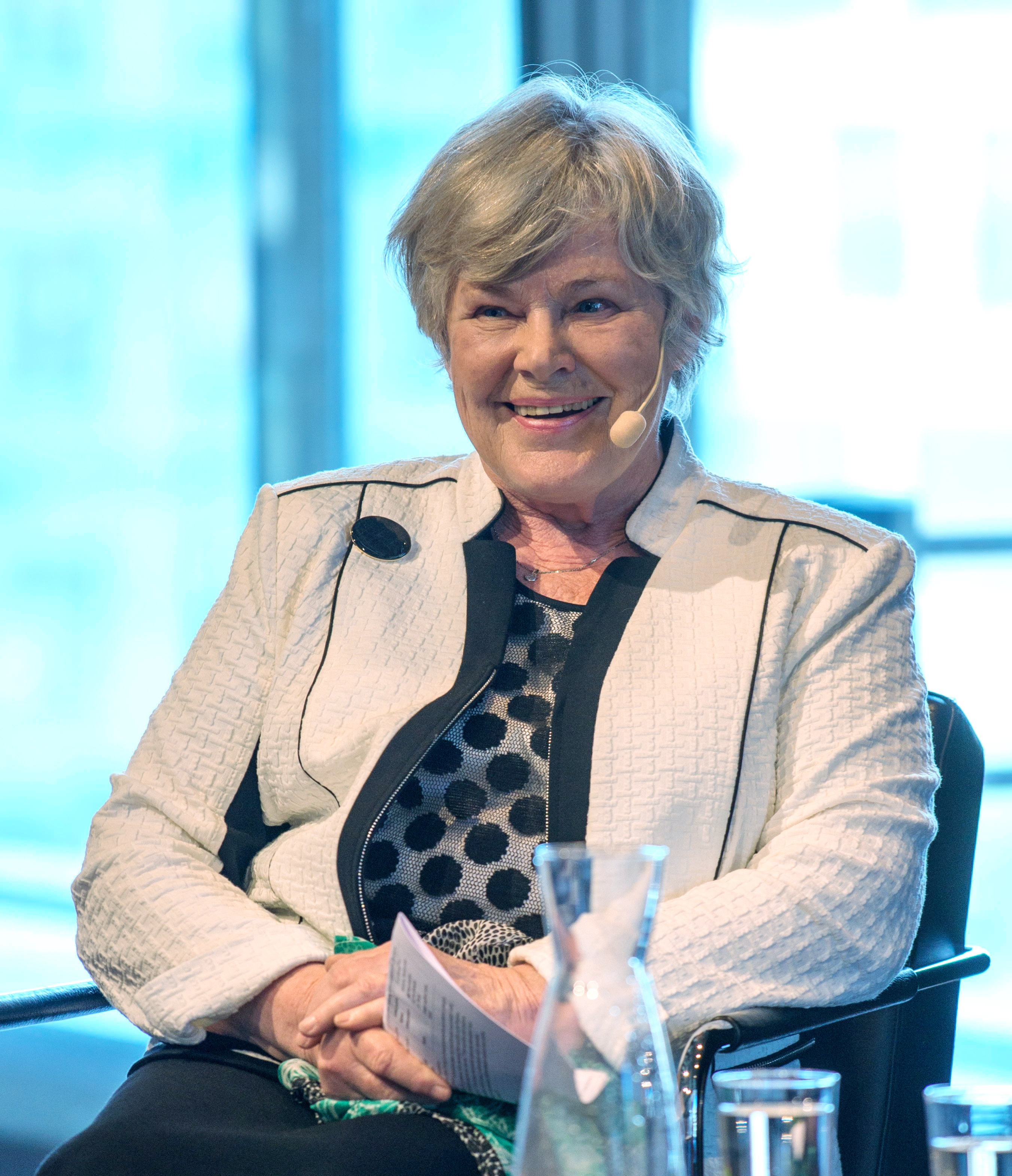 Elisabeth Rehn på Kulturhuset Stadsteatern i Stockholm med anledning av att det är 70 år sedan Fredsdagen i Europa. Seminariet har temat "Fred och diplomati".